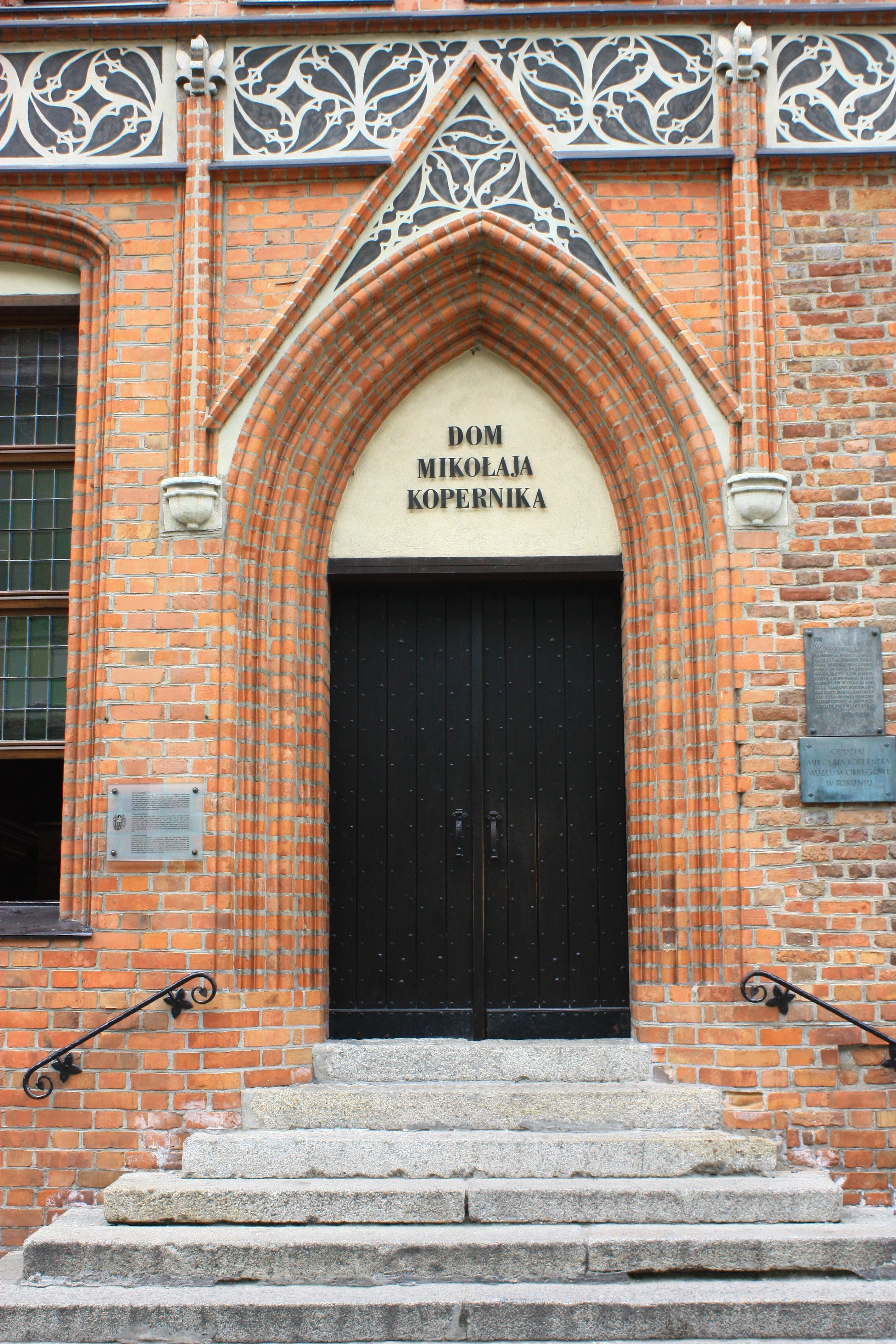 Toruń, kamienica "Dom Kopernika", ok. 1464-80, XIX